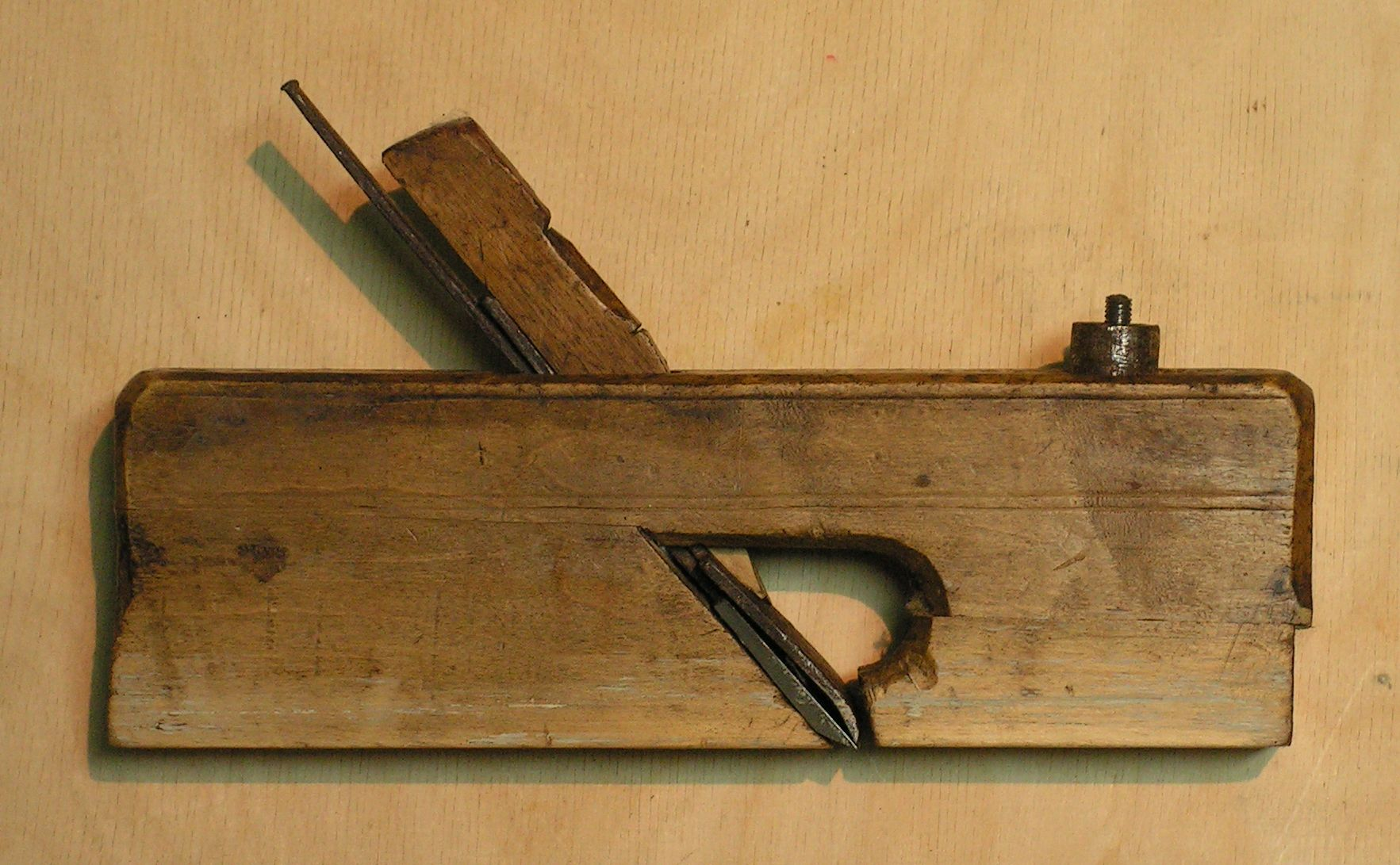 Strug kątnik z regulowaną szczeliną roboczą. Widoczne ostrze z nakładką.